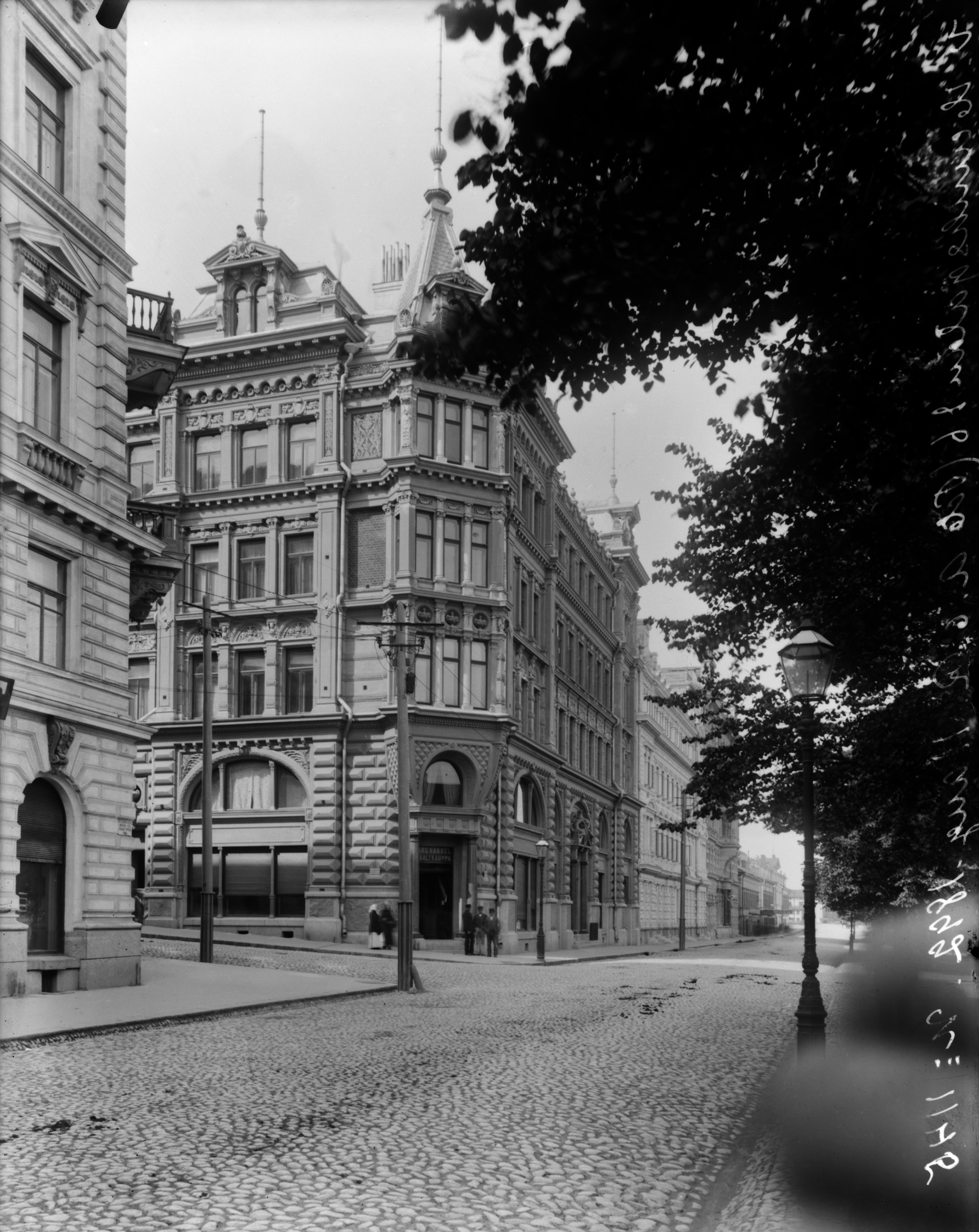 Huberin talo, Läntinen Heikinkatu 16 (nykyisin Mannerheimintie 14)